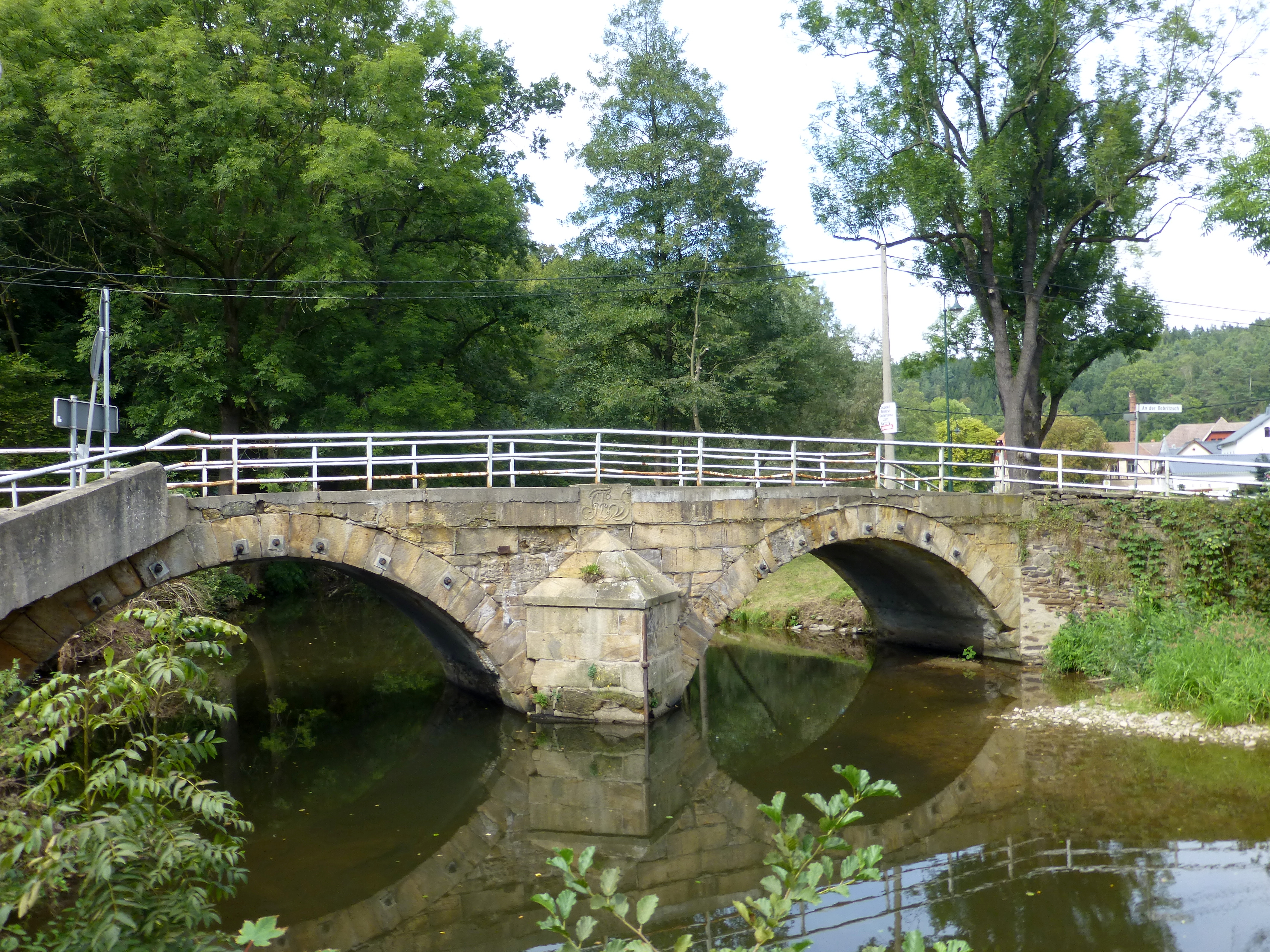 Straßenbrücke über die Bobritzsch in Krummenhennersdorf, Gemeinde Halsbürcke, Sachsen.